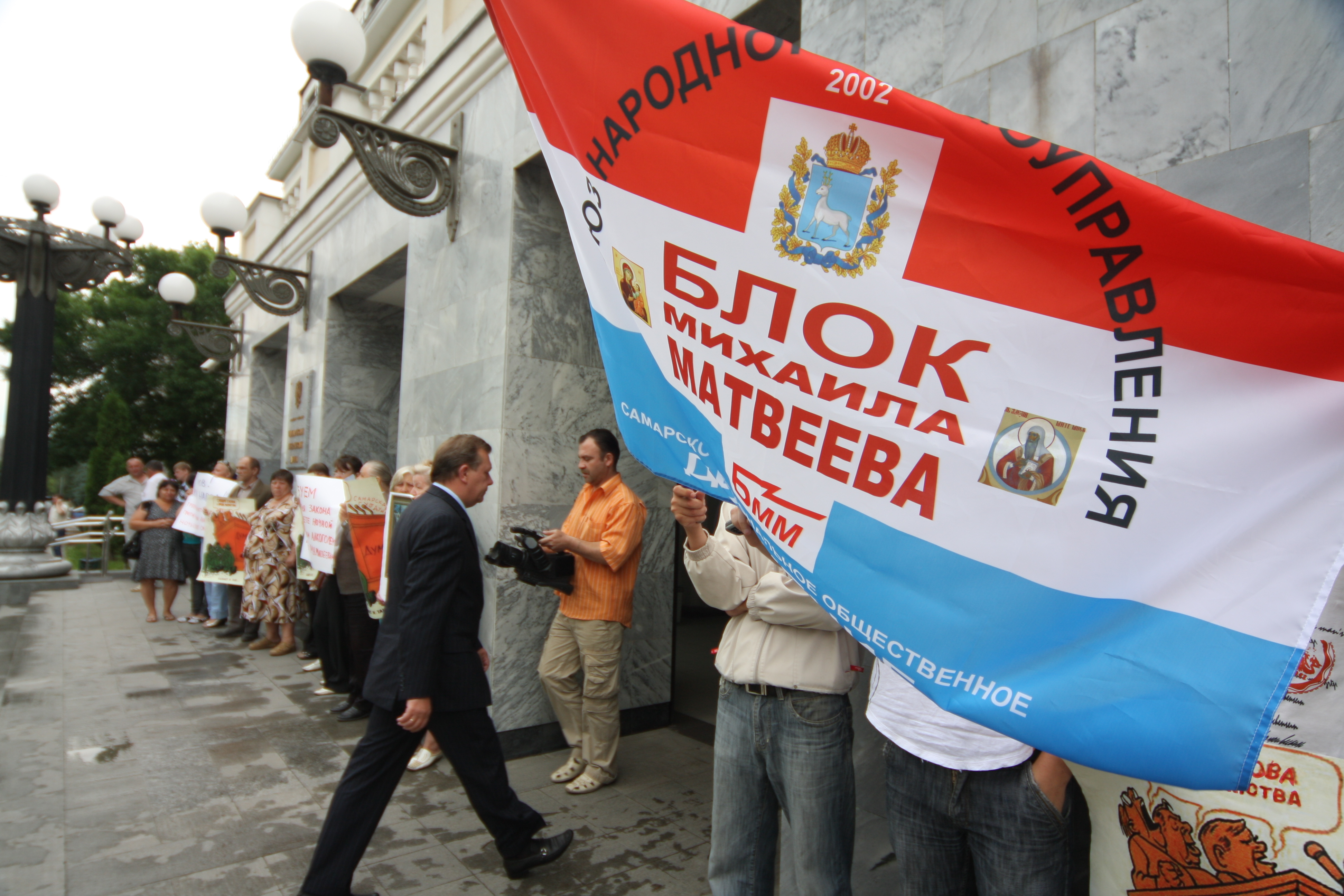 Пикет Блока Михаила Матвеева,2010 г.